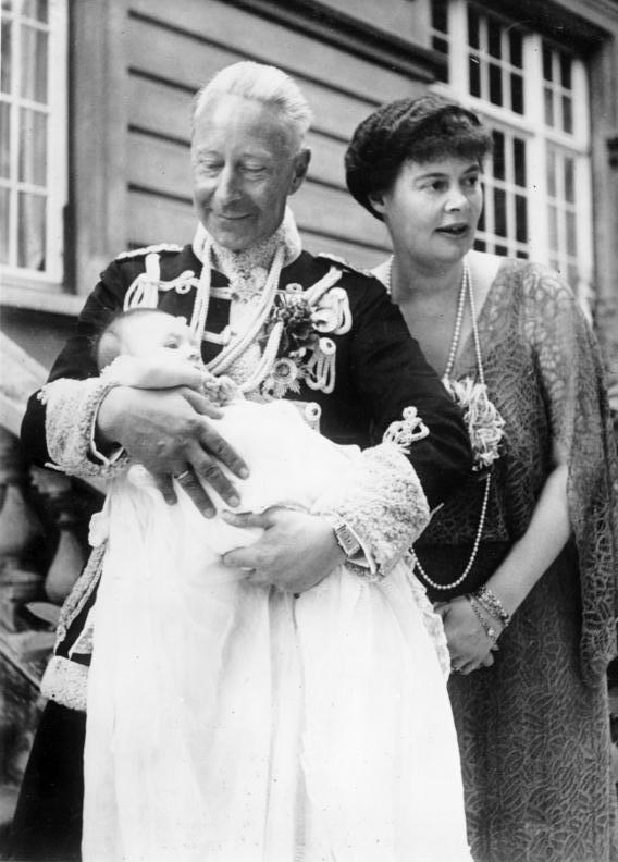 Das Kronprinzenpaar mit erster Enkelin Das erste Enkelkind des Kronprinzenpaares. Prinz Wilhelm von Preussen, der älteste Sohn des Kronprinzen-Paares, der sich vor Jahresfrist in Bonn mit Fräulein von Salviati verheiratete, ist am 7.Juni 1934 Vater eines Töchterchens geworden, das am 3. Oktober in Bonn in Gegenwart des Kronprinzenpaares auf den Namen Felicitas getauft wurde. UBz: Kronprinz Wilhelm und Kronprinzessin Cecilie mit ihrem ersten Enkelkind nach der Tauffeier. Aufnahme: E. Rolffs 38293-34 Abgebildete Personen: Preußen, Wilhelm von: 1882-1951, Kronprinz, Chef des Hauses Hohenzollern 1941-1951, Deutschland Preußen, Cecilie von: 1886-1954, verheiratet mit Kronprinz Wilhelm, Tochter Großherzog Friedrich Franz III. von Mecklenburg-Schwerin, Deutschland Preußen, Felicitas von (* 1934), Baby, Prinzessin